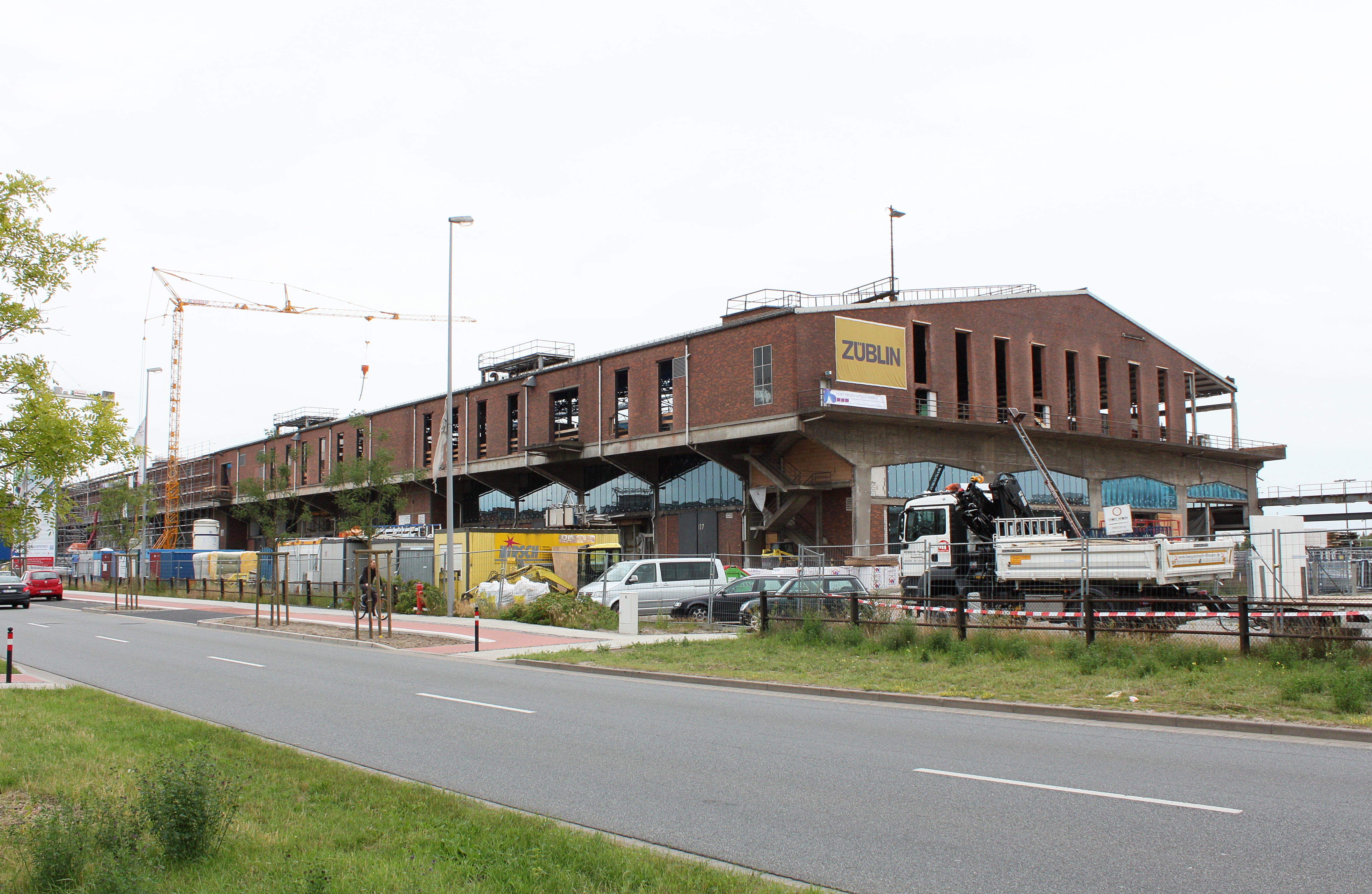 Schuppen 1, Bremen Ueberseestadt, Konsul-Smidt-Str.